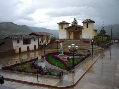 Plaza de Armas de Llumpa remodelada para la recepción del milenio en curso.